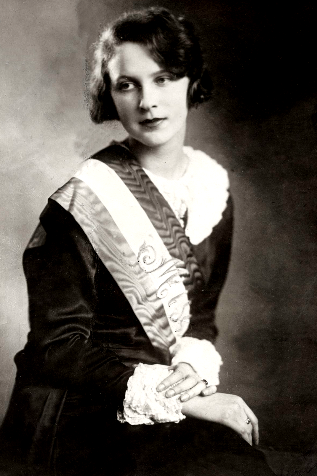 Simon Böske született Simon Erzsébet (Keszthely, 1909. február 15. – Budapest, 1970. október 28.) az első magyar szépségkirálynő, akit 1929-ben Miss Európává is választottak.